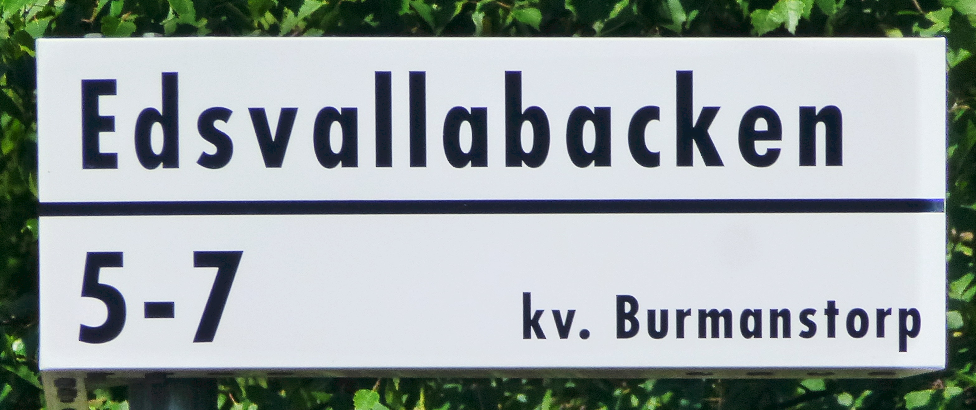 Edsvallabacken - kvarteret Burmanstorp